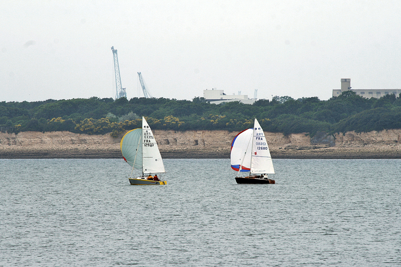 Deux corsaires a la Rochelle